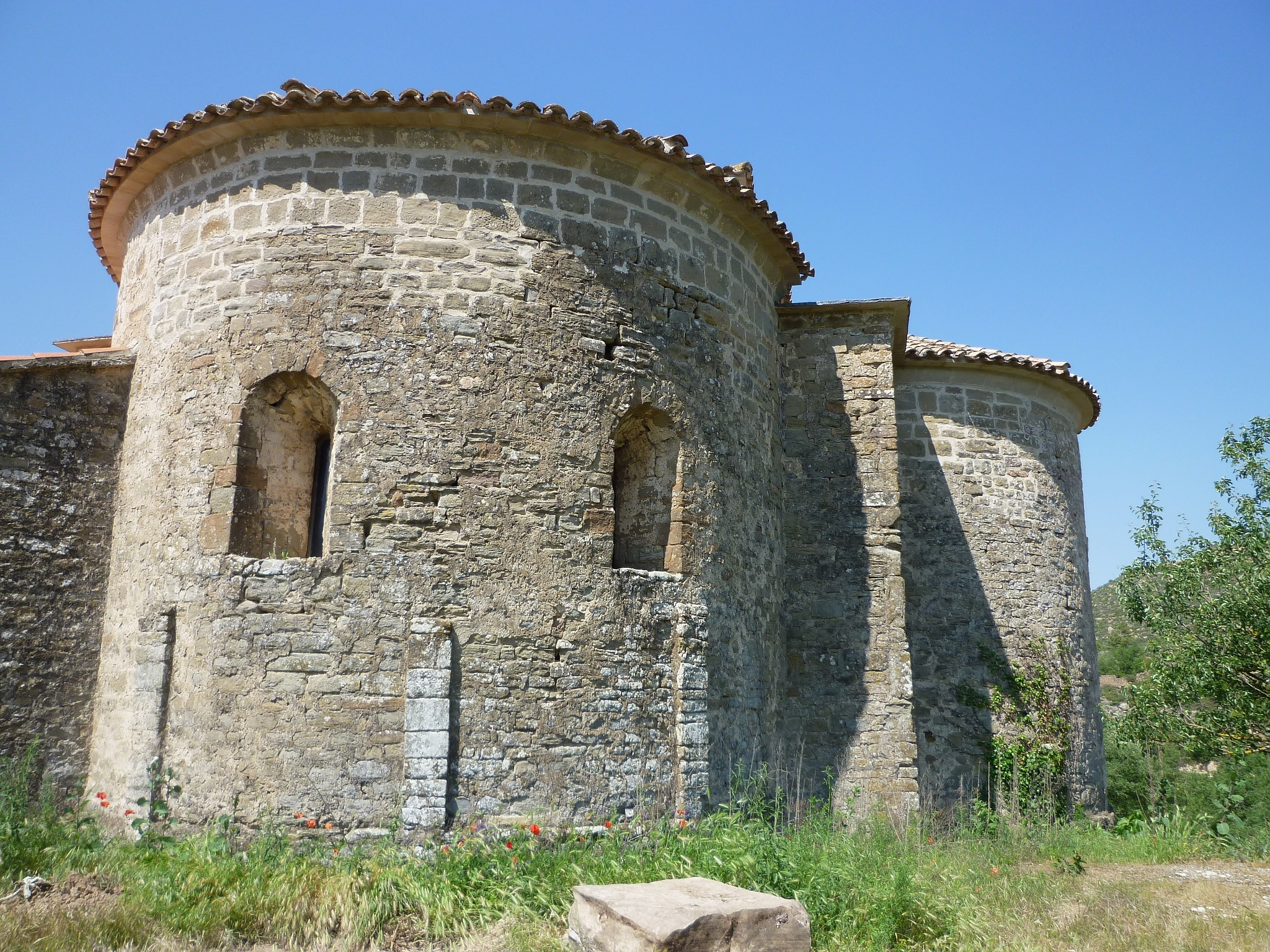 Absis central i lateral nord de l'esglèsia del Monestir de Cellers, a Torà (Segarra)